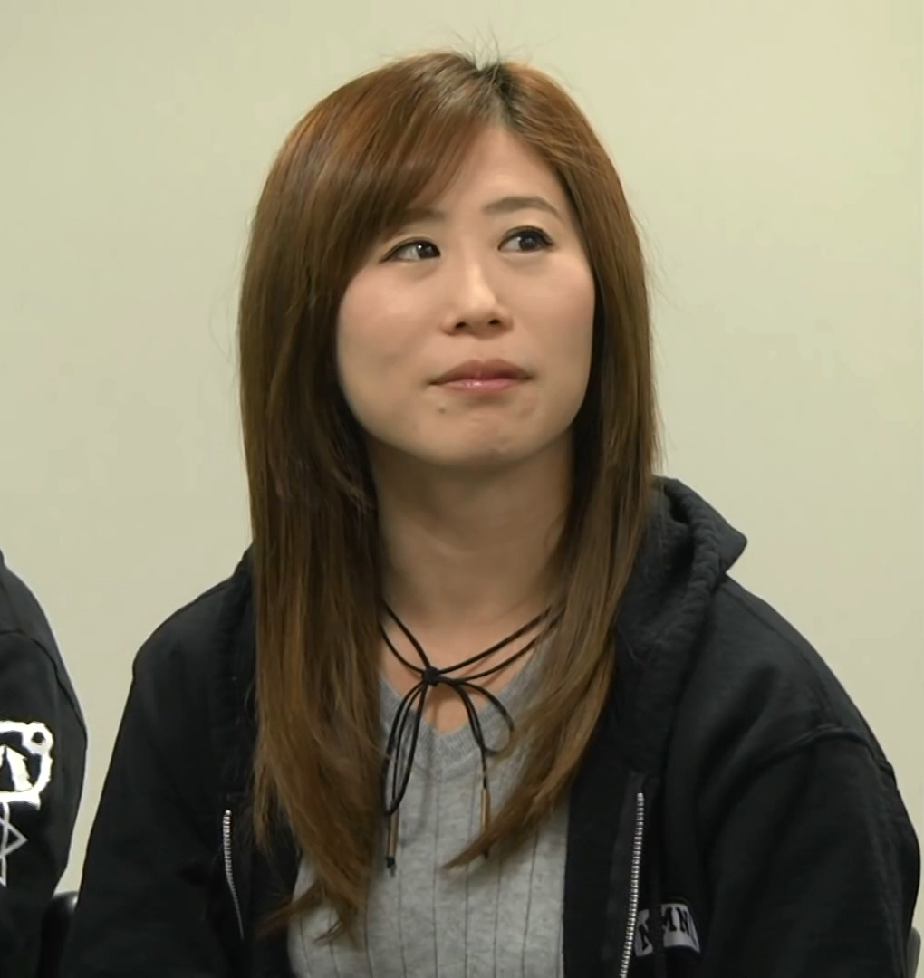 2017.1.26 横浜プロレス祭り 開催発表記者会